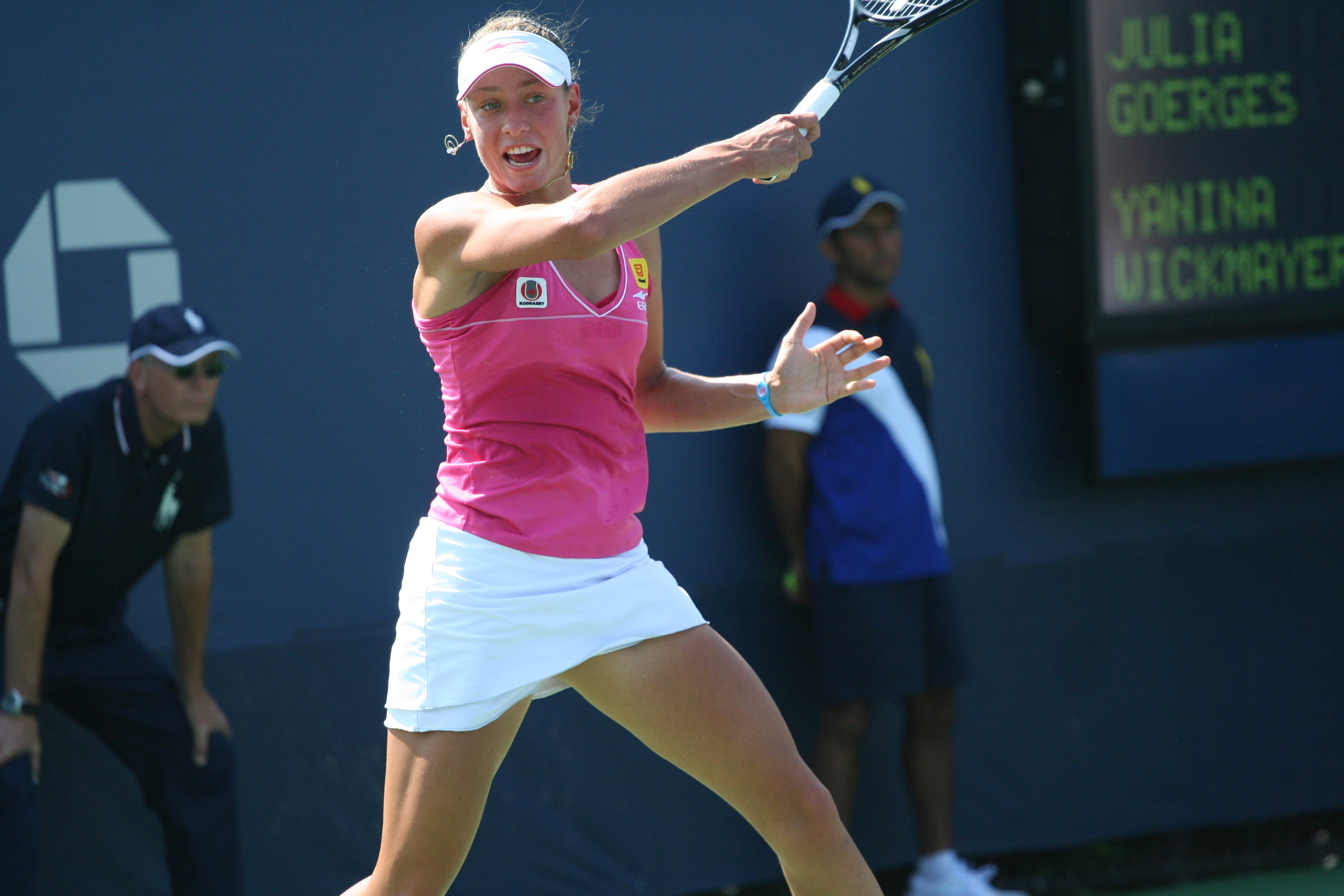 U.S. Open Sept. 2, 2010